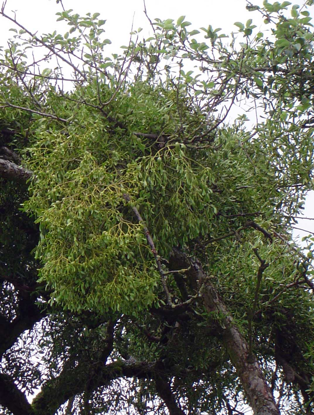 Viscum album, maretak in oude appelboom eigen foto